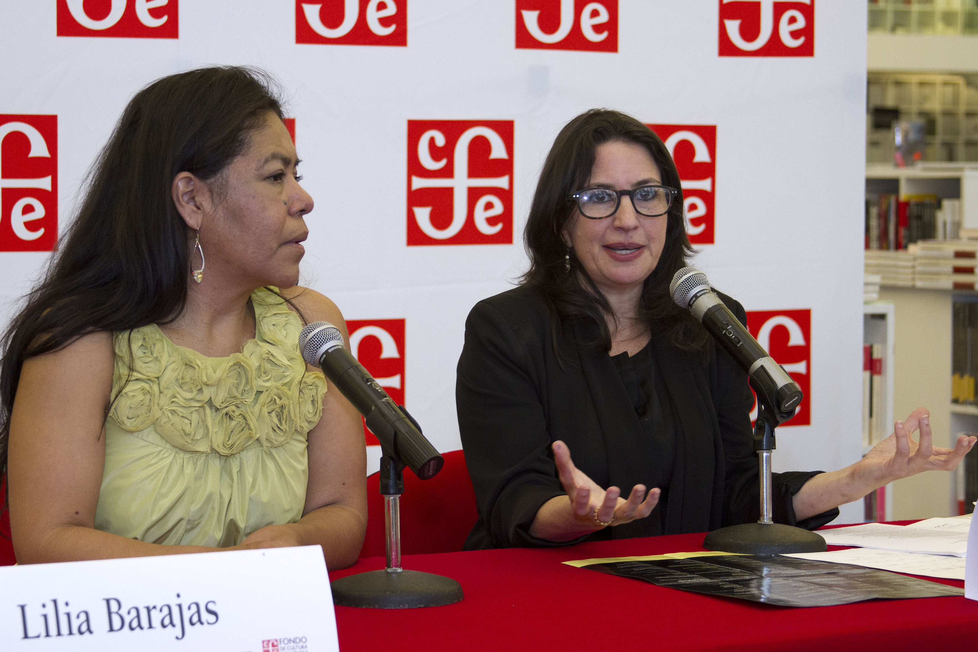 Miércoles 28 de Abril 2015. Conferencia de prensa para anunciar las actividades de la VI Edición de la Feria del Libro Independiente, con sede en la Librería del Fondo de Cultura Económica Rosario Castellanos, el evento estuvo encabezado por: Deborah Holtz, Héctor Pons y Lilia Barajas. Foto: Tania Victoria / Secretaría de Cultura.